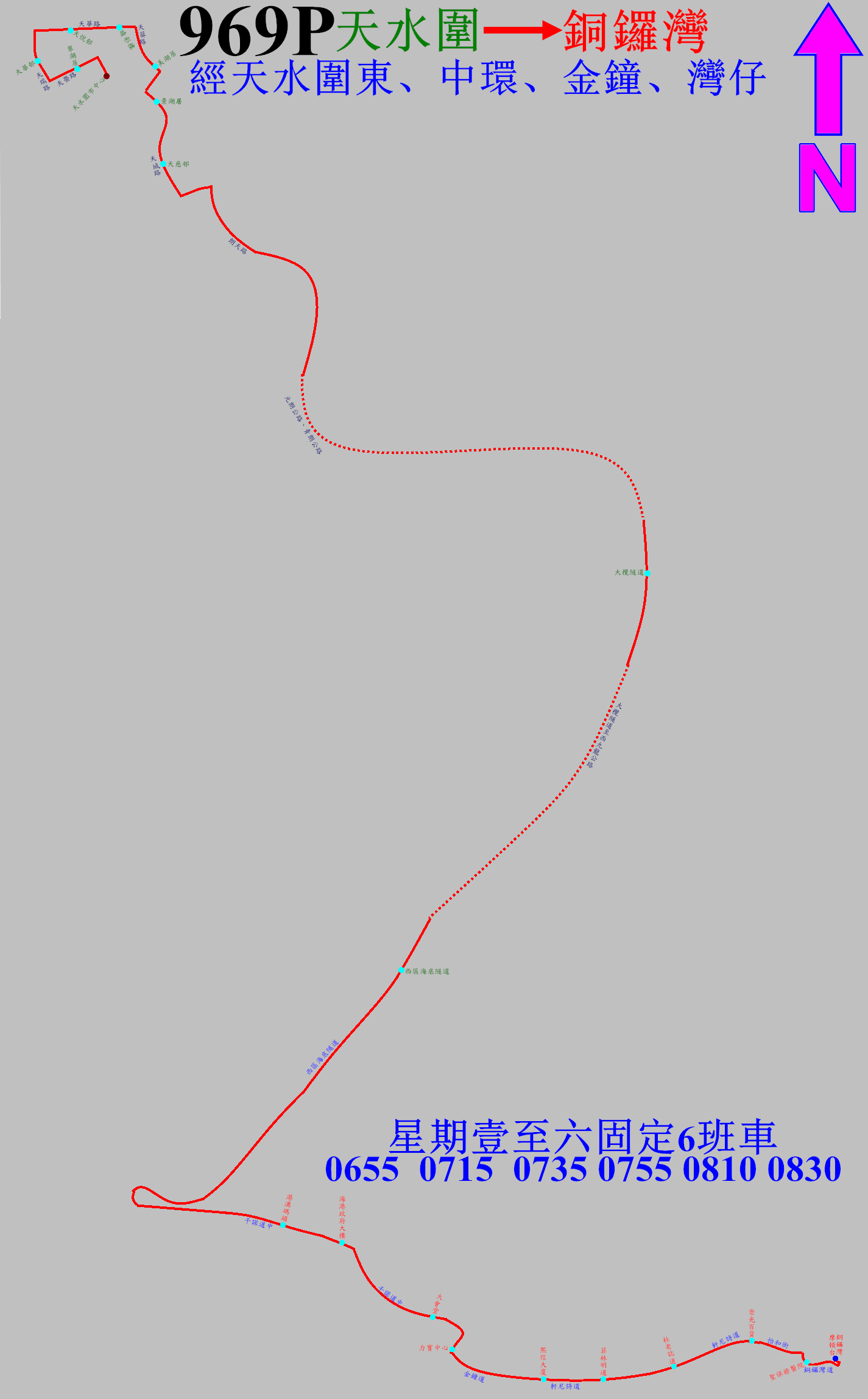 中文（香港）: 過海隧巴969P線的走線圖